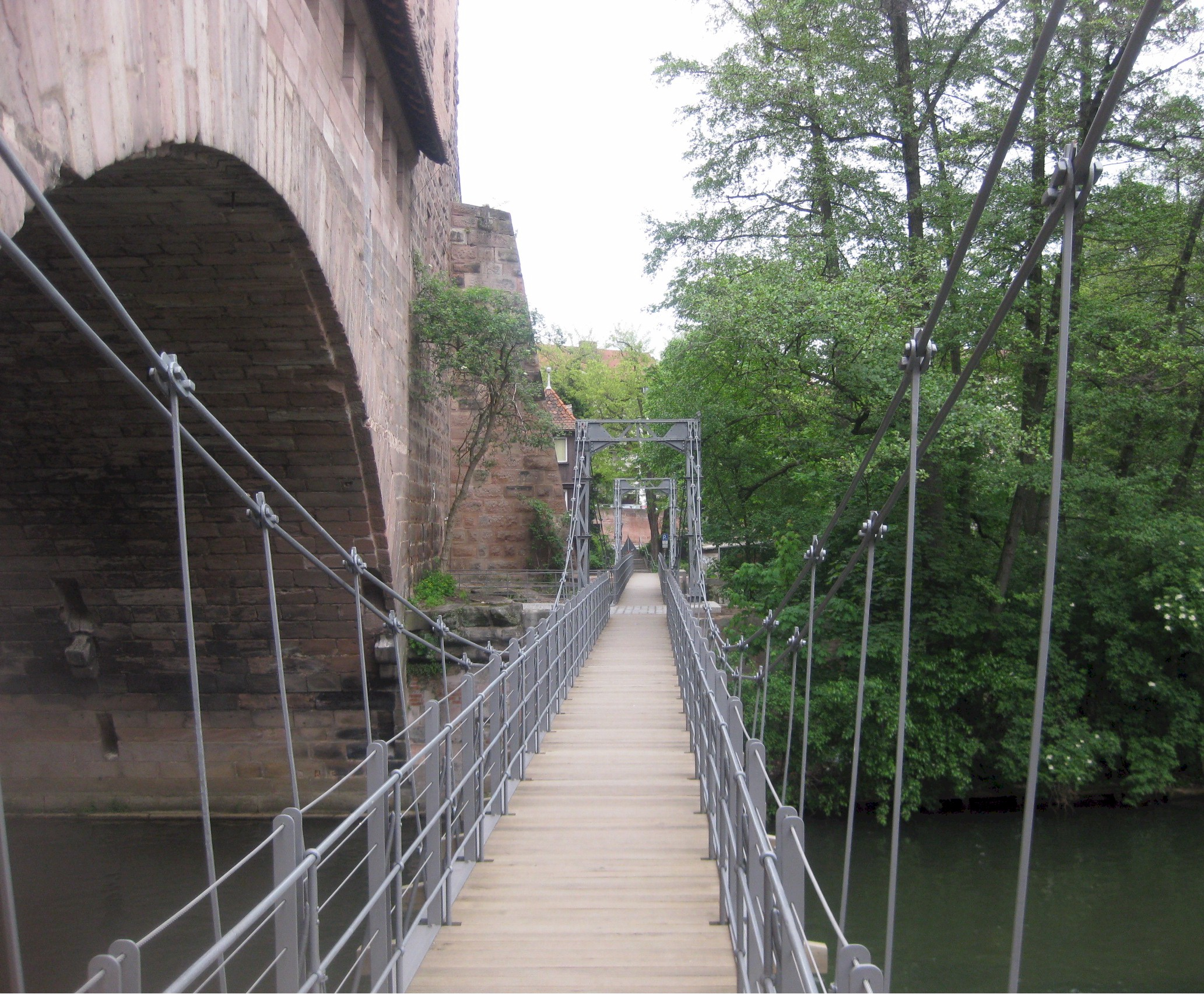 Kettensteg (Nürnberg); Blick über den Bohlenweg nach Norden (2011)